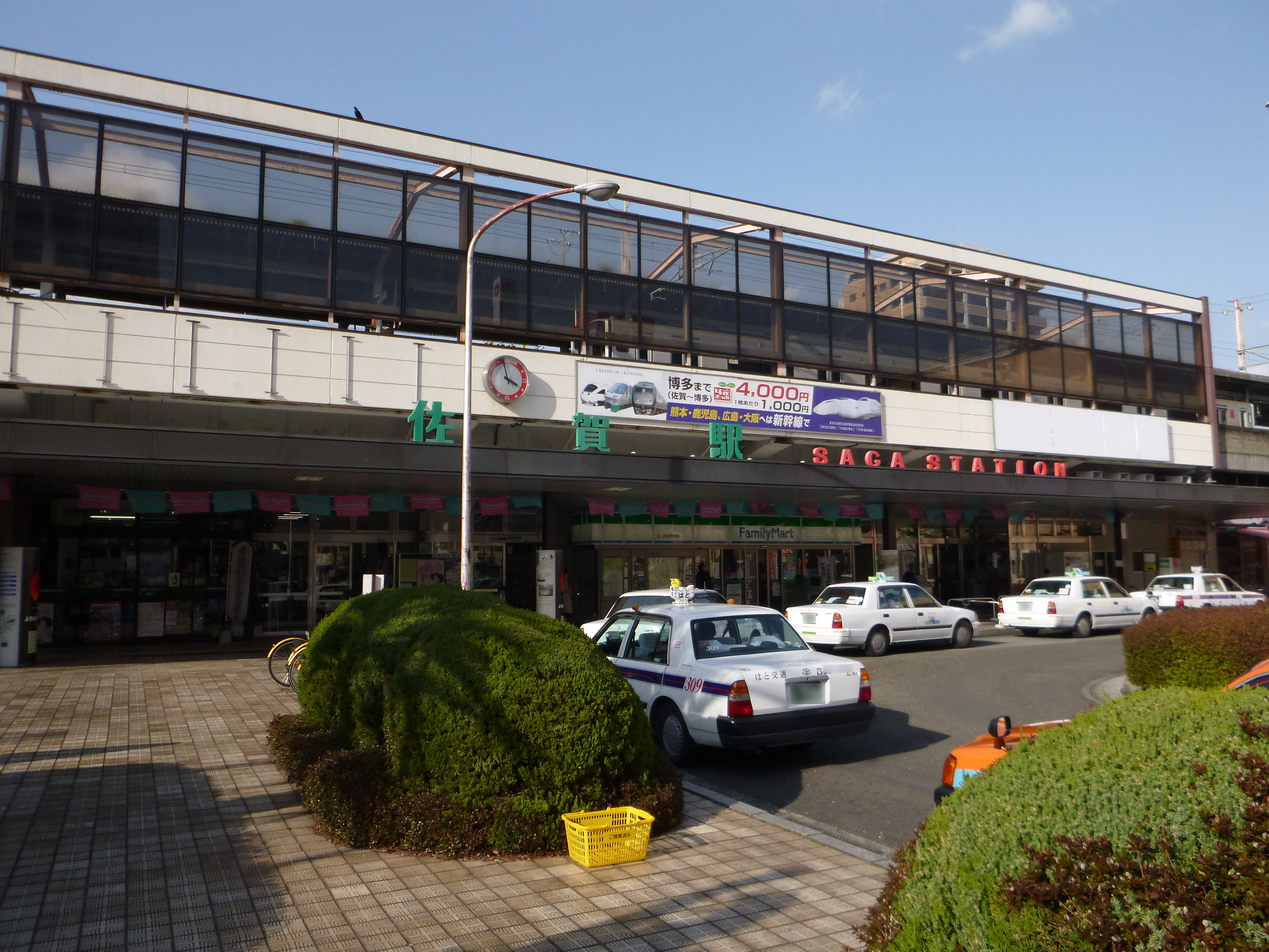 佐賀駅南口